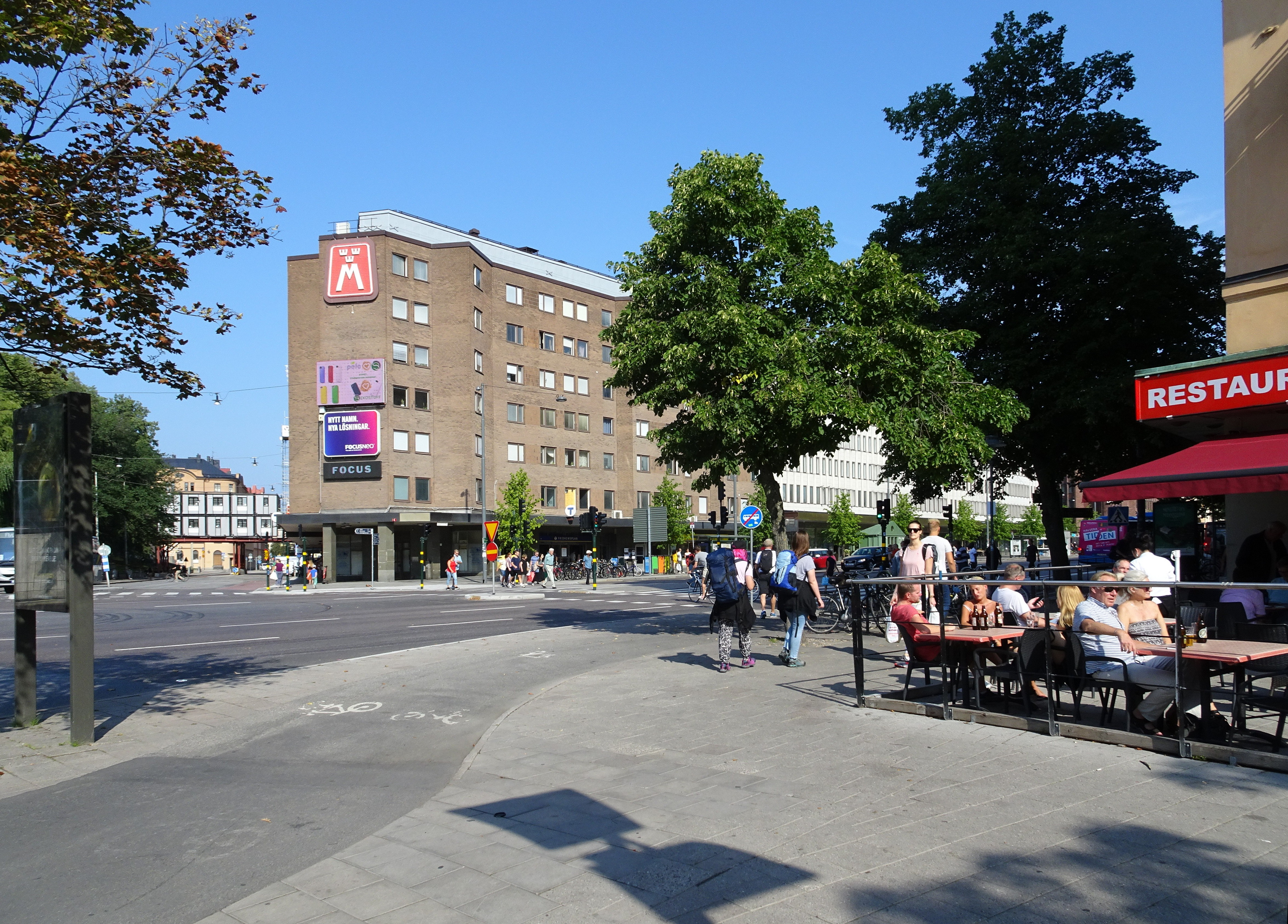 Fridhemsplan